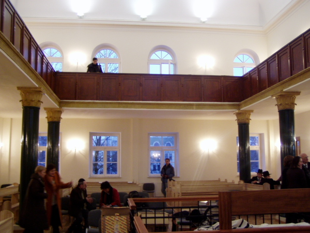 Synagogue in Jeszywas Chachmej Lublin